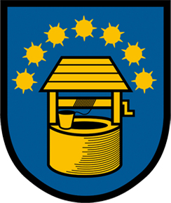 Wappen der Gemeinde Pilgersdorf